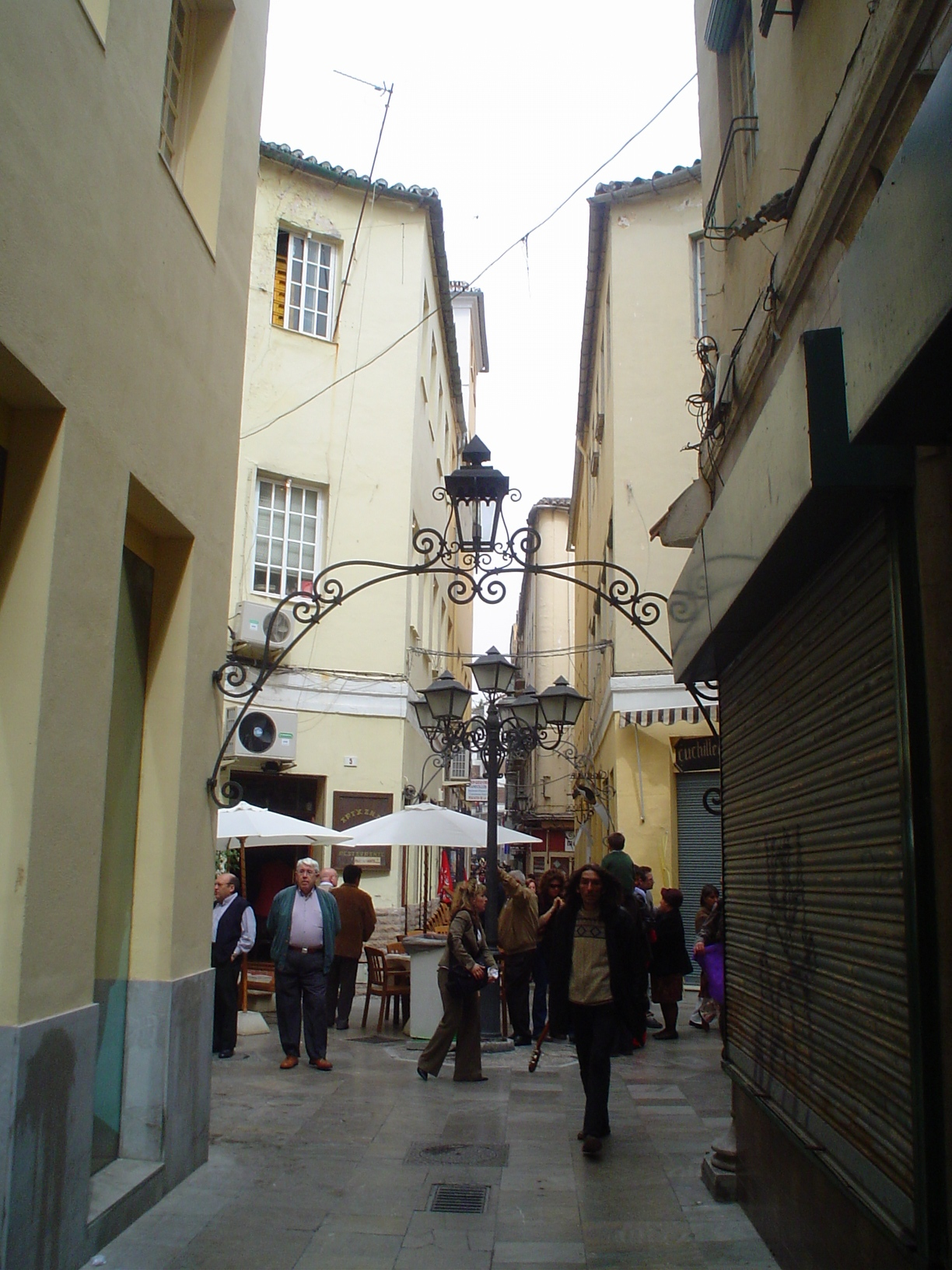 Pasaje Chinitas, Málaga, España